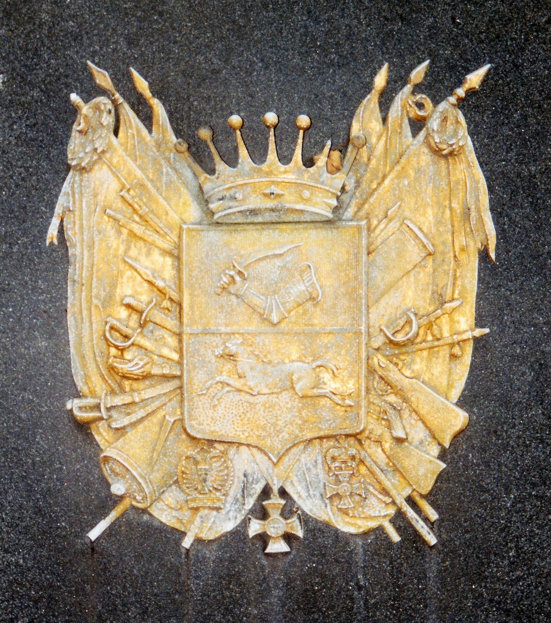 Wappenrelief auf dem Grab des k.u.k. Feldmarschallleutnants Ludwig Freiherrn von Pulz, Ritter des Militär-Maria-Theresien-Ordens, auf dem Wiener Zentralfriedhof (Gruppe 13A). Das in dieser Aufnahme aus dem Jänner 2002 noch vorhandene metallene Wappenrelief war im November 2017 entfernt.